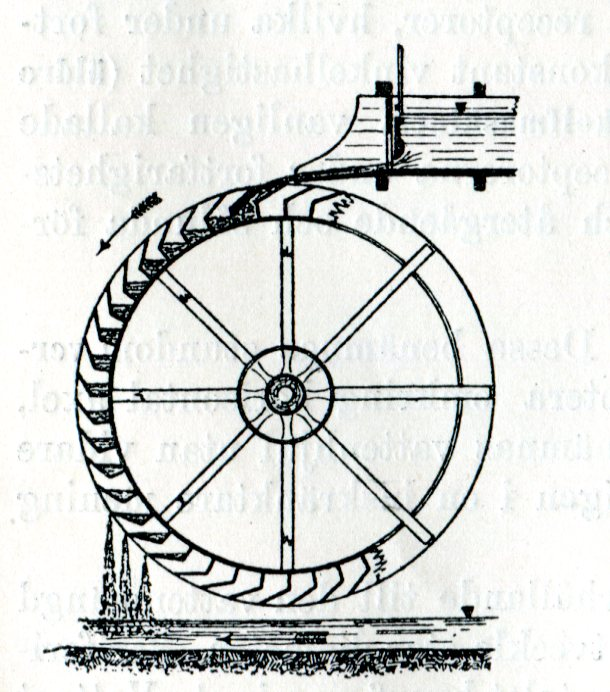 Verkar genom vattnets tyngd